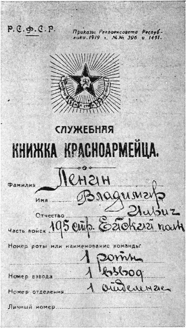 Служебная книжка почётного красноармейца В. И. Ленина